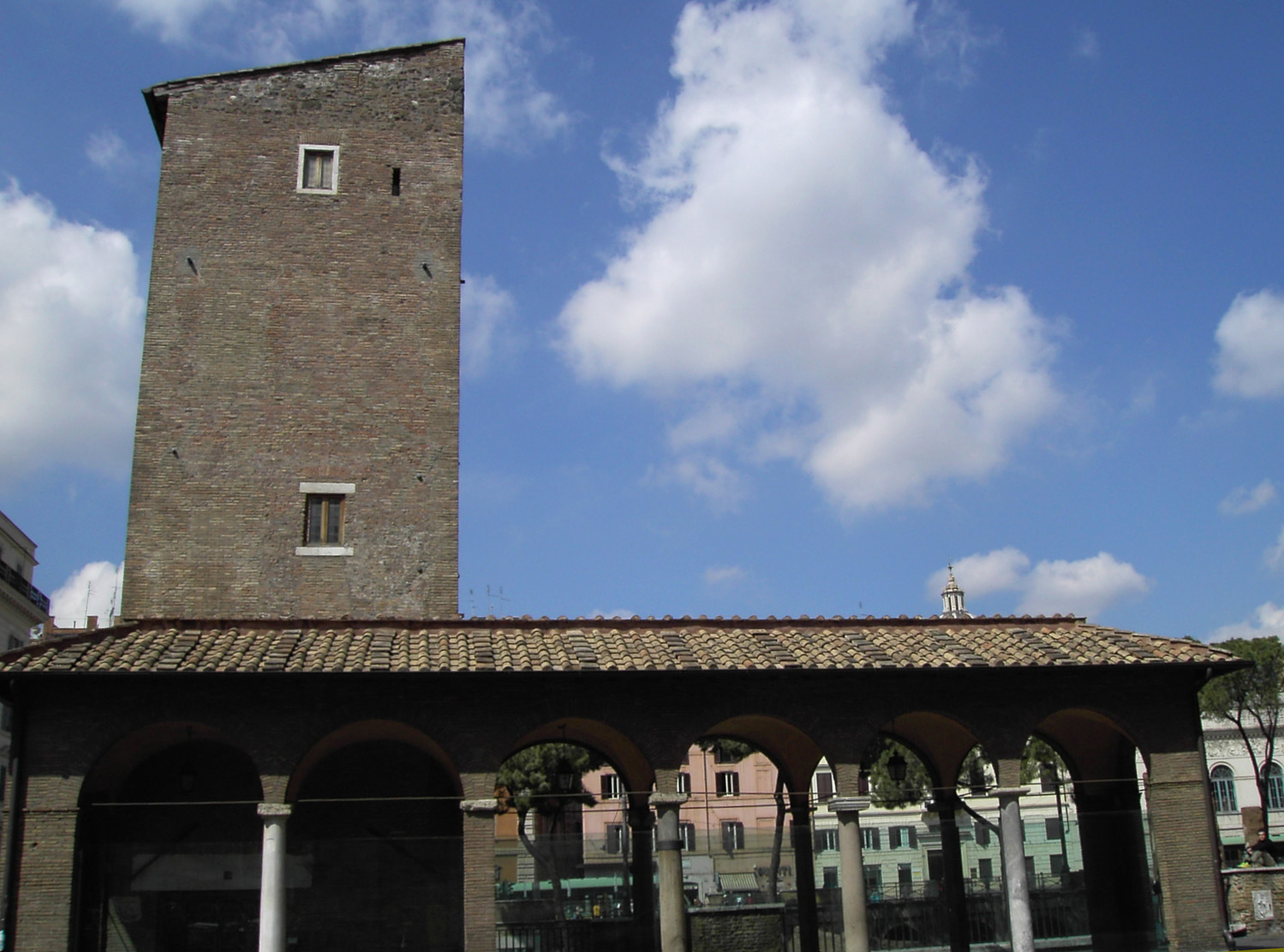 Roma, largo Argentina, Torre del papito by Lalupa